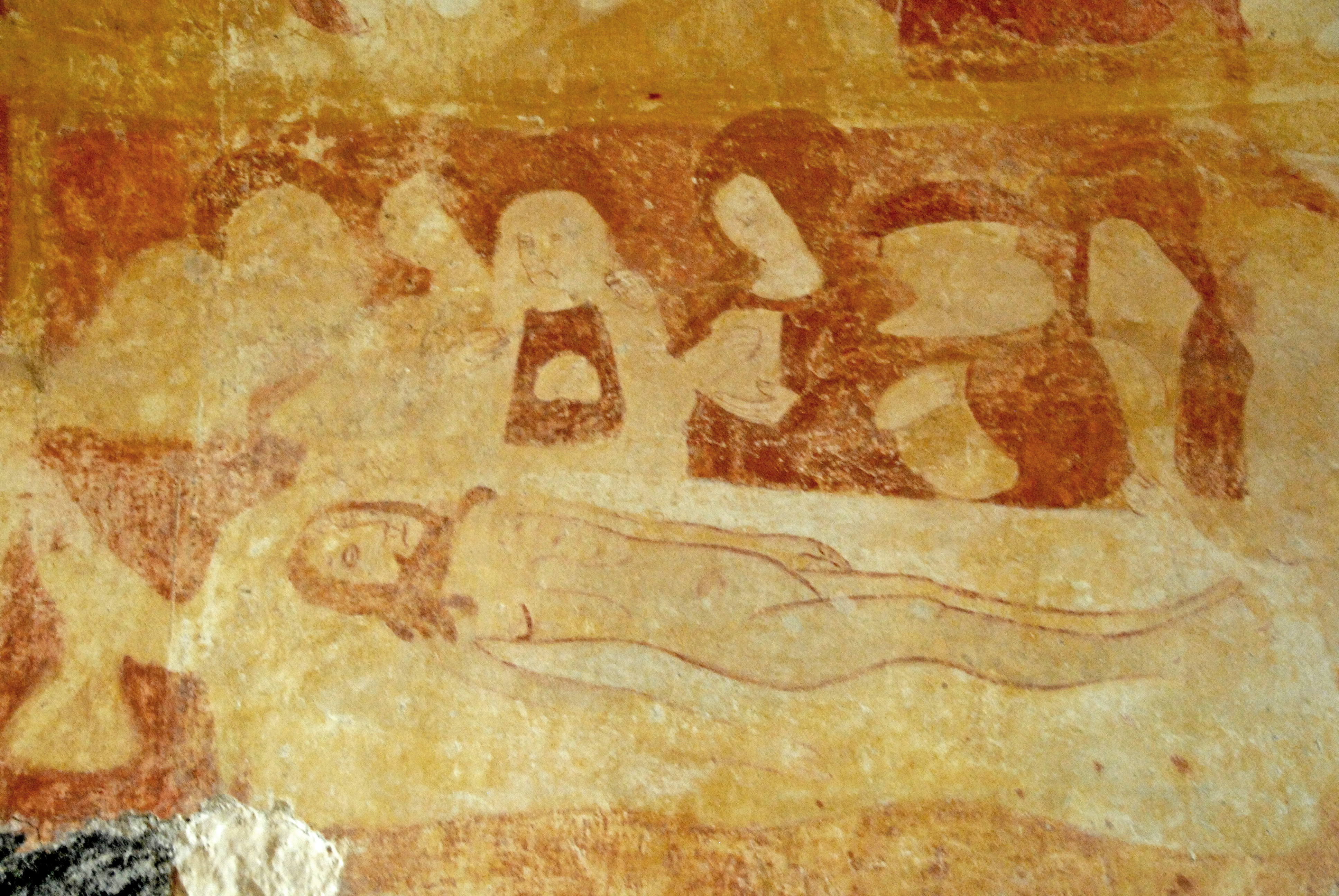 Kirche, Kapelle, Fresken, Südwand, Grablegung